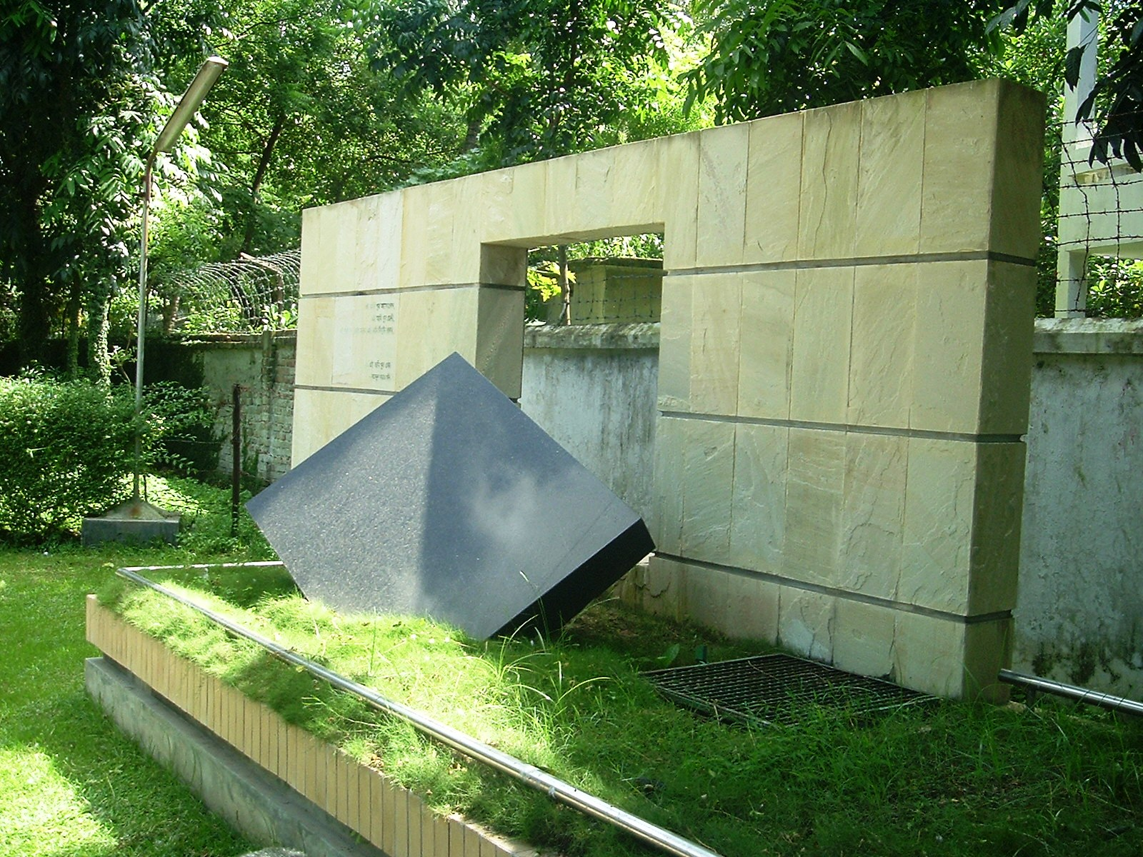 Soni Memorial, BUET, Dhaka.